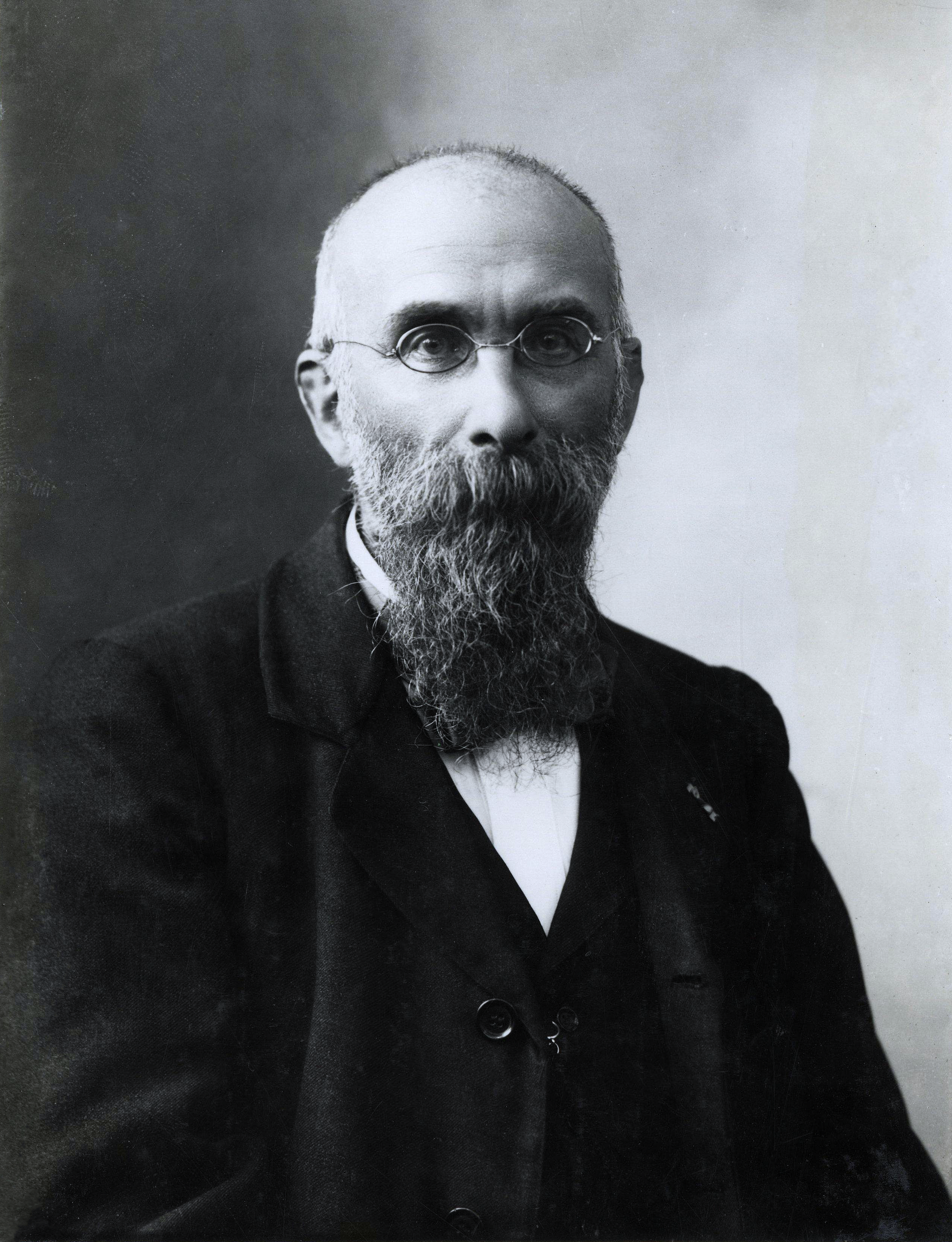 Abraham Jacobus Servaas van Rooijen (Utrecht, 30 mei 1839 – Den Haag, 12 december 1925) was een Nederlands uitgever, archivaris en publicist. Hij was de eerste gemeentearchivaris van de stad Den Haag.